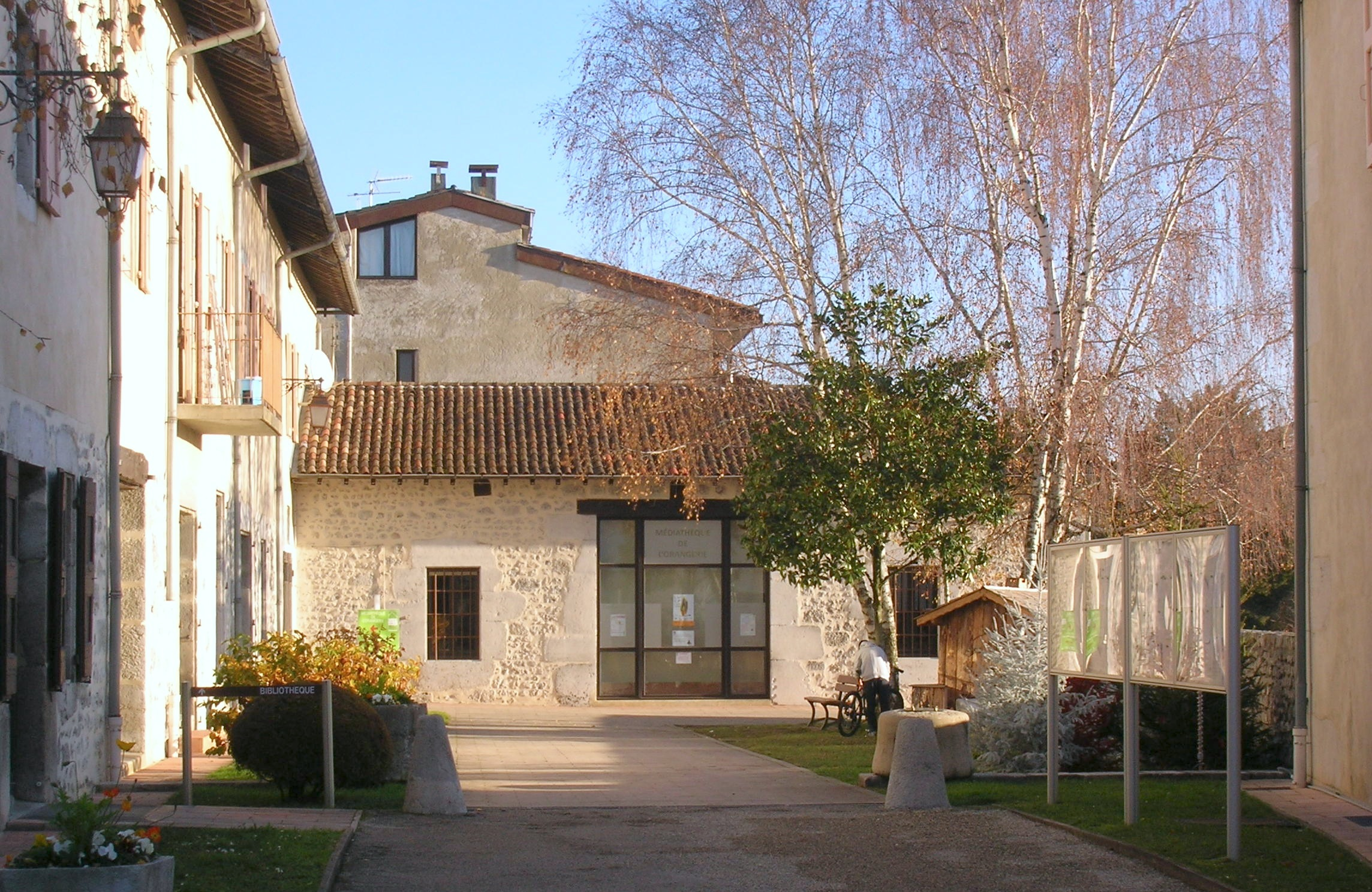 Saint-Ismier, Isère, Rhone-Alpes, France. bibliothèque